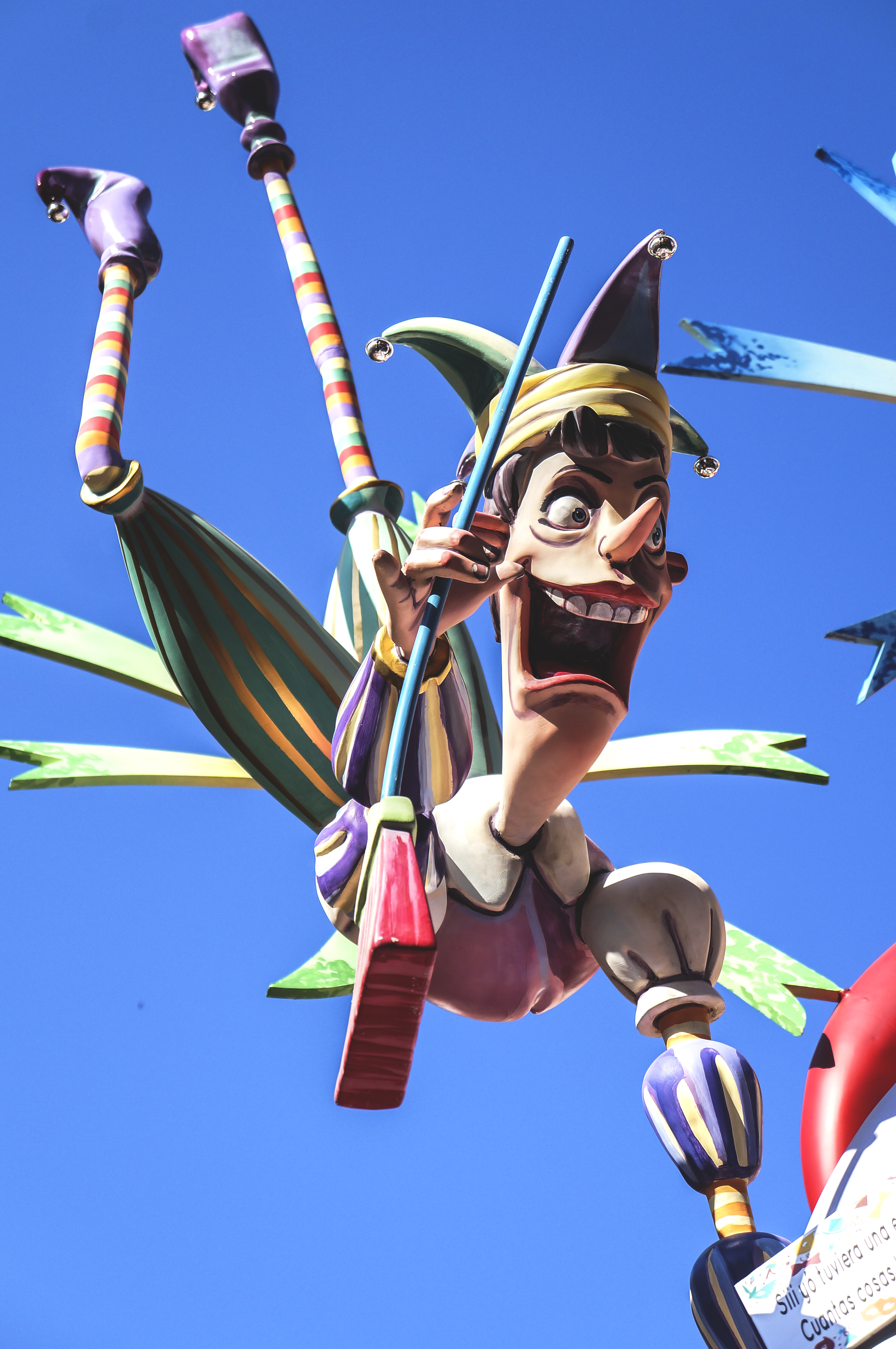 Hoguera La Florida-Plaza Magallanes. This is a photography of a Folklore festival in Spain (Wikidata id Q1236370).